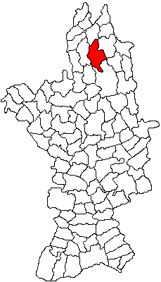 Categorie:Hărţi ale judeţului Olt